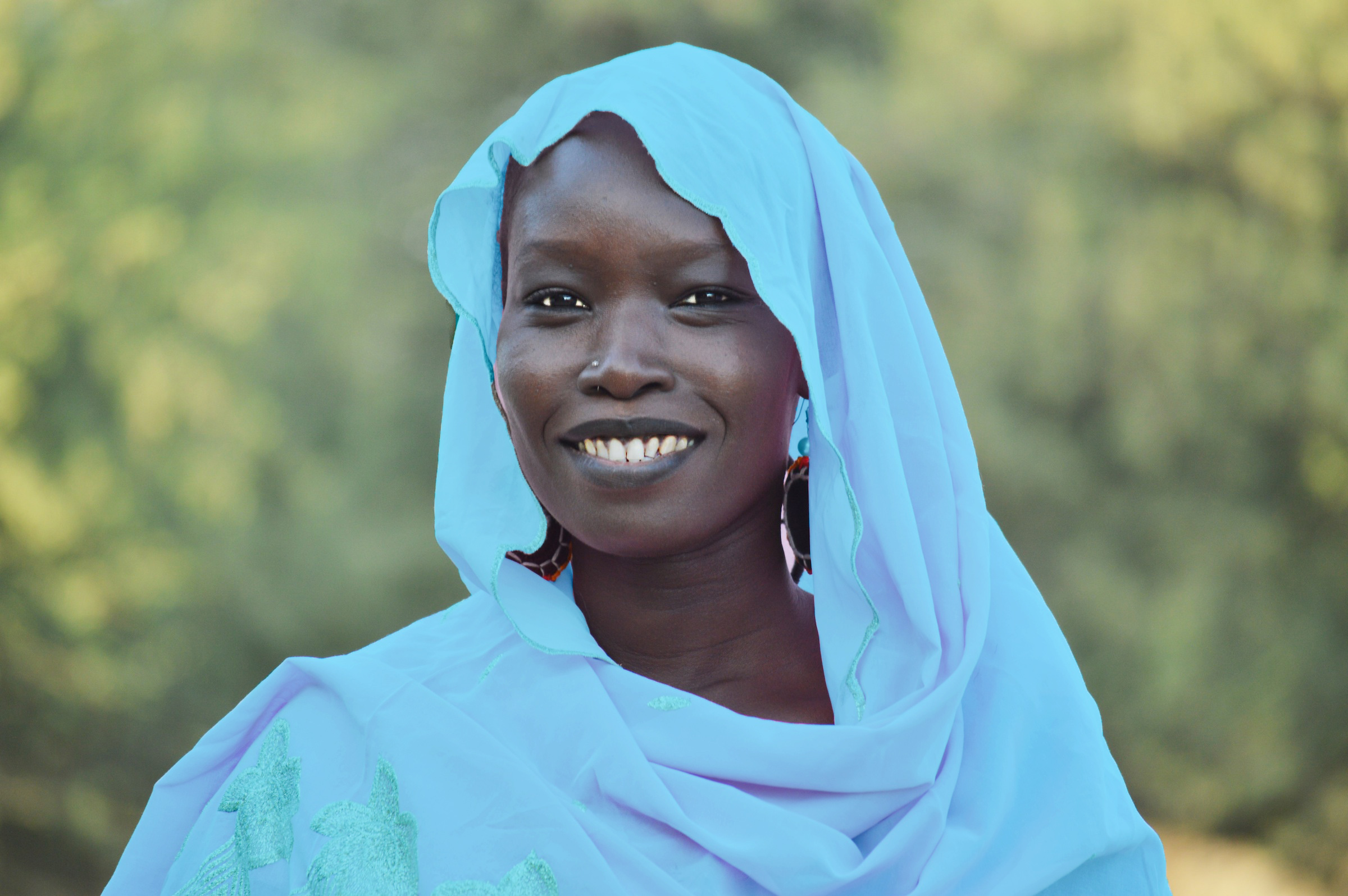 Portrait de Salma Khalil